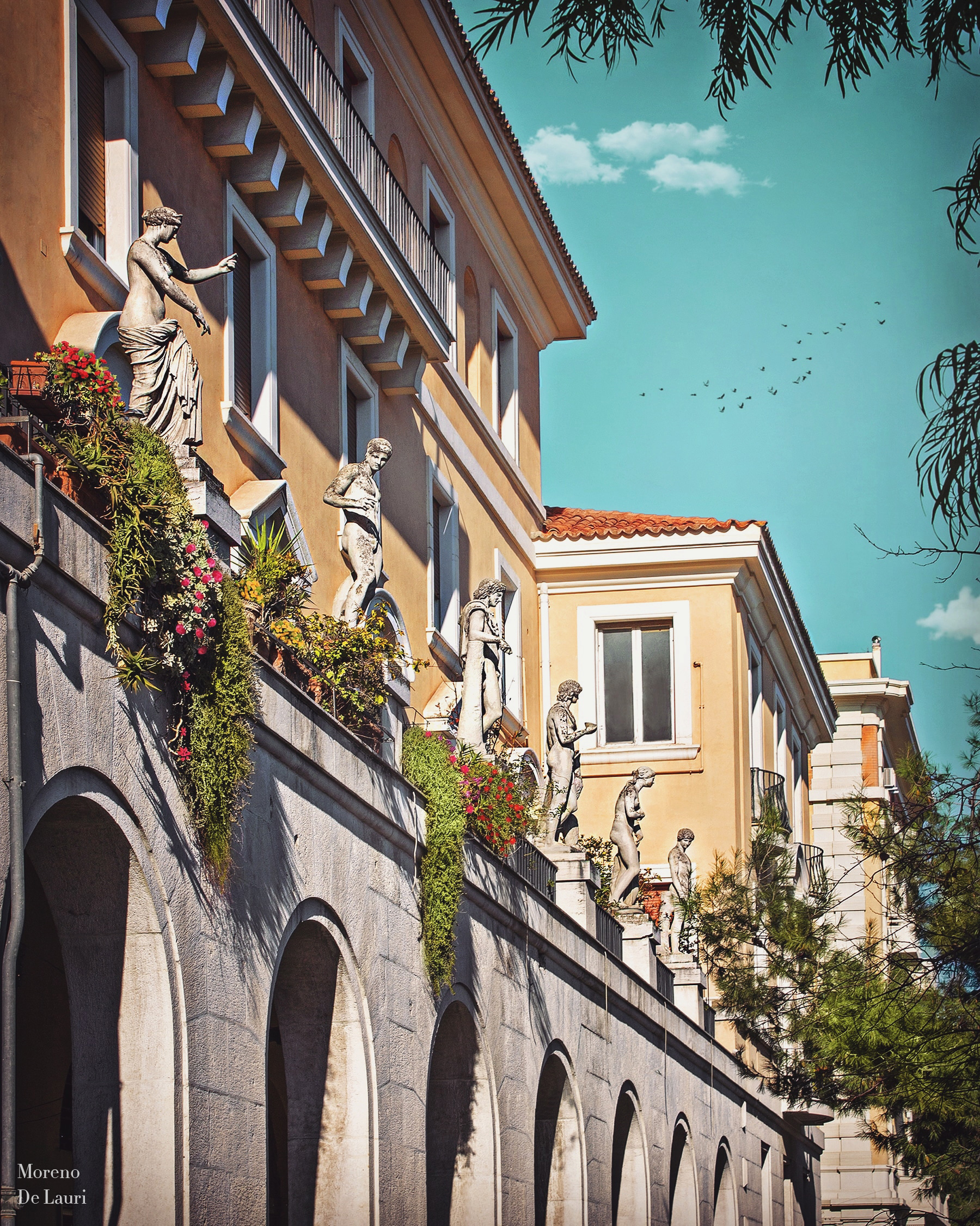 Nel cuore del centro di Foggia è presente una struttura di un fascino e di un’architettura risalenti direttamente all’antica Roma: il Palazzo delle Statue. Questo edificio è così chiamato proprio per merito delle 6 sculture presenti sul terrazzo della struttura di piazzale Italia. La semplicità di questo edificio, dopotutto, è data proprio dal disegno molto lineare con i richiami all’architettura romana, che da sempre si contraddistingue per l’eleganza e la raffinatezza delle sue costruzioni.